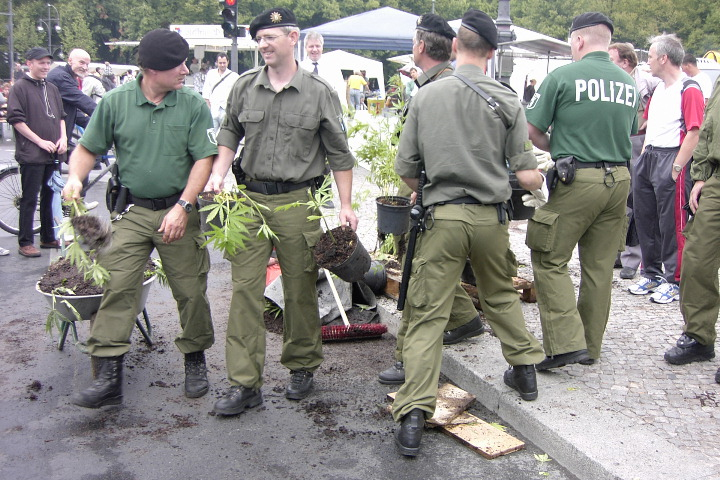 Abschneiden des Faserhanfes durch die Berliner Polizei auf der Hanfparade 2006 in Berlin 187 strassenbande